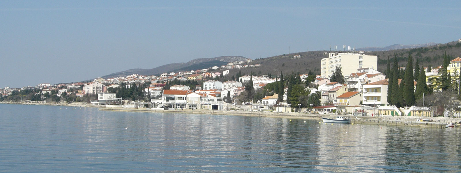 Selce, Croatia